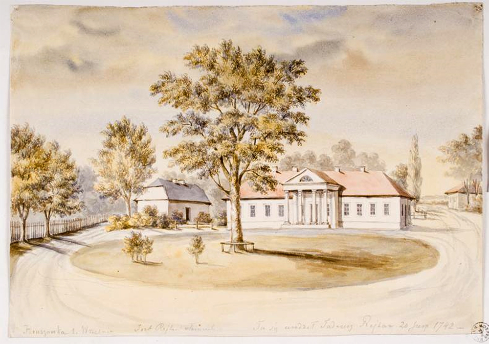 Беларуская (тарашкевіца): Грушаўка (Hrušaŭka), сядзіба Рэйтанаў (Rejtan)